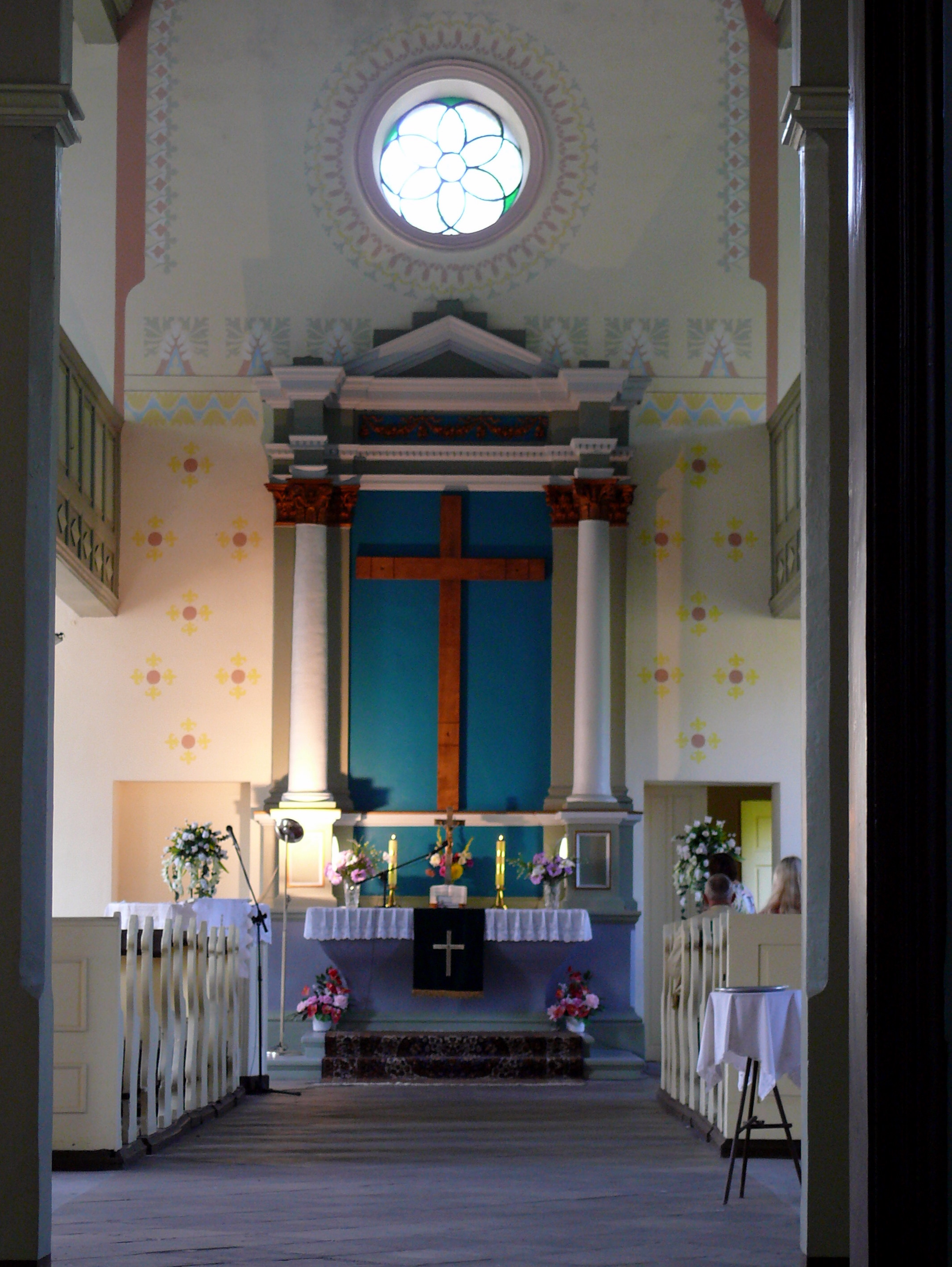 Ołtarz w kościele luterańskim Opatrzności Bożej w Kole